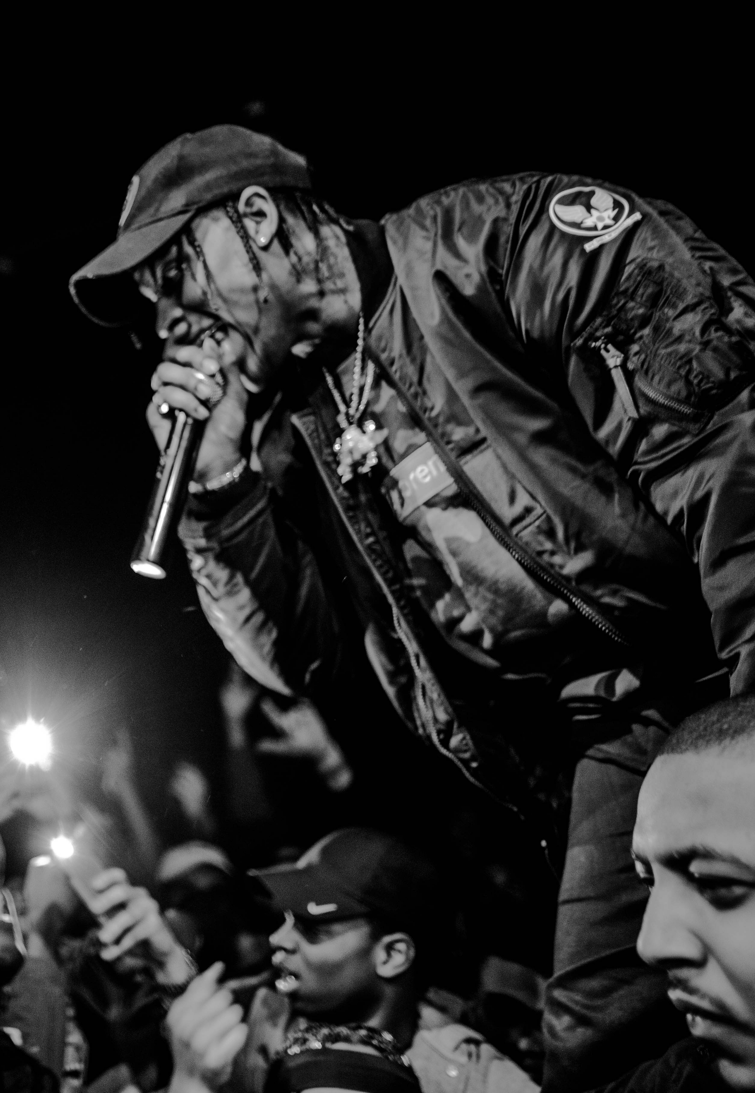 Рэпер Travis Scott, 2016